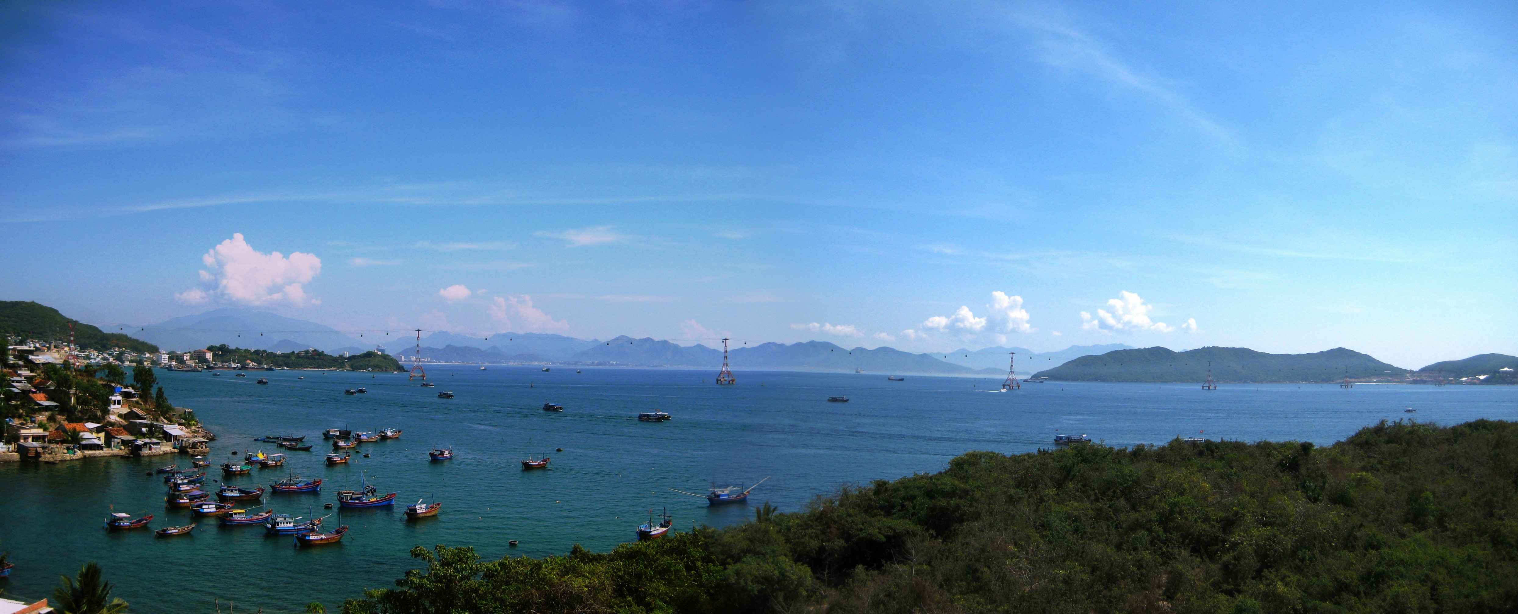 Bờ biển Nha Trang nhìn từ trên cao